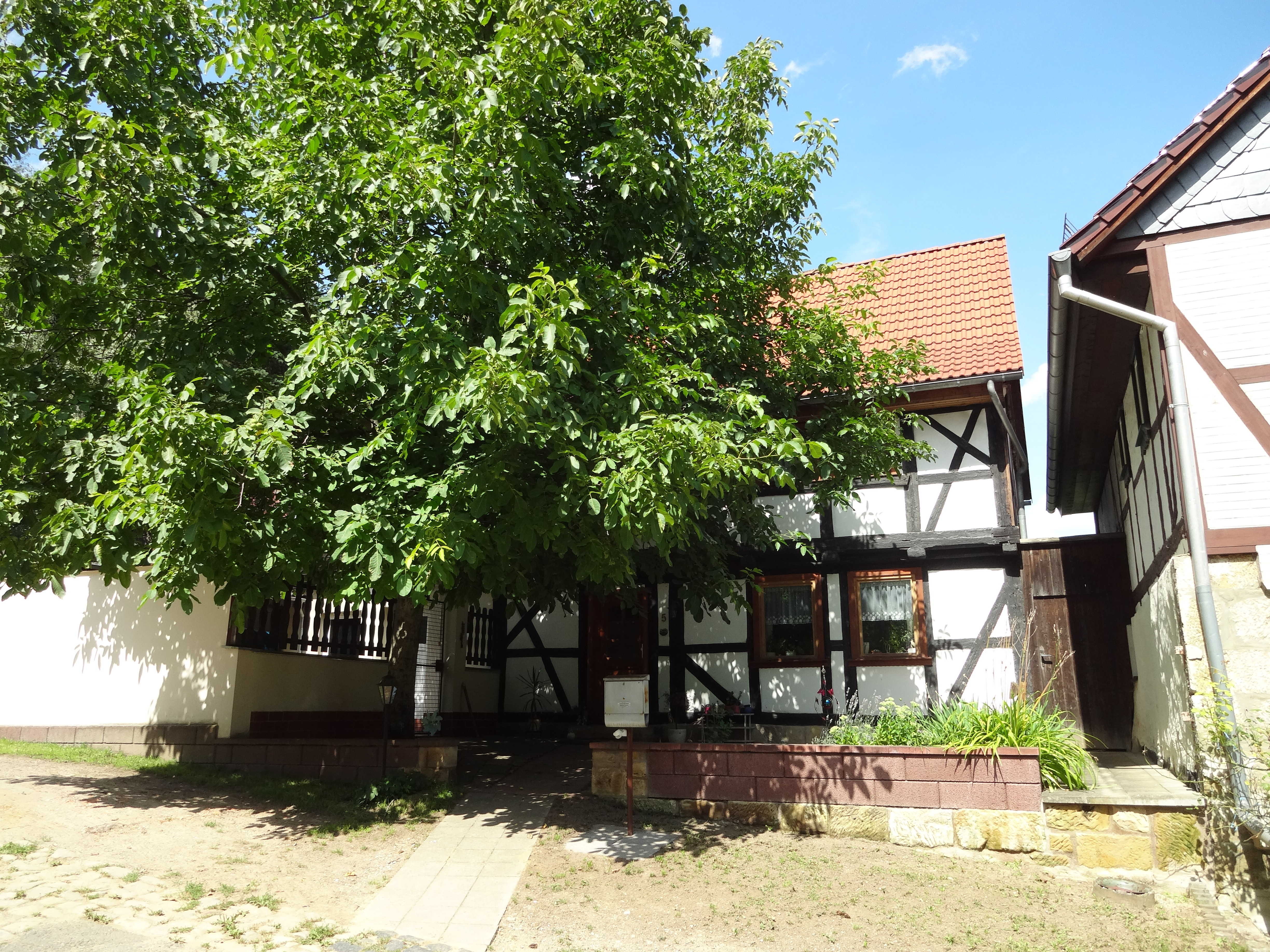 denkmalgeschütztes in Börnecke, Ortsteil von Blankenburg/Harz